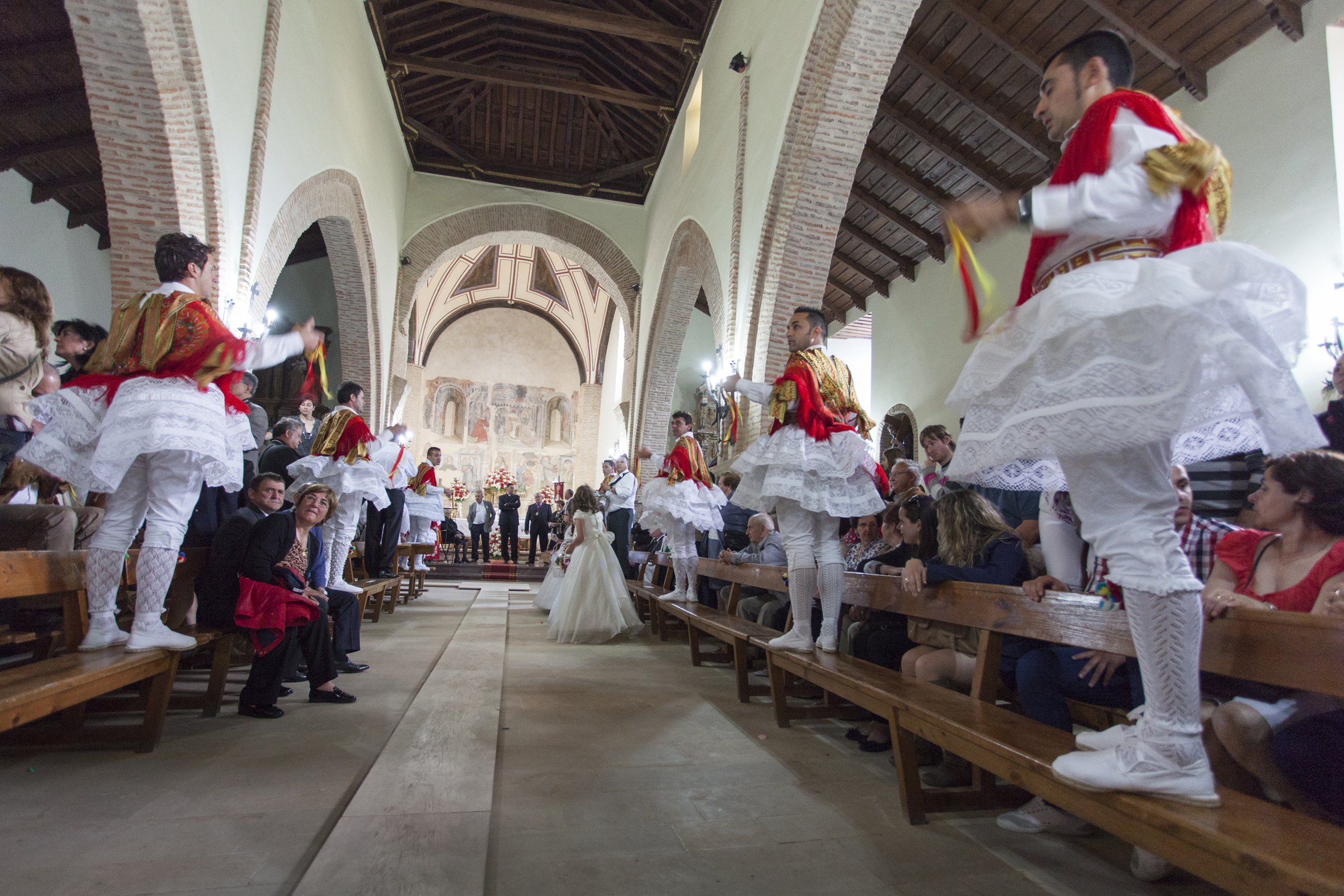 Corpus Christi en Laguna de Negrillos. León, España. Junio 2012. This is a photography of a Folklore festival in Spain (Wikidata id Q17627979).